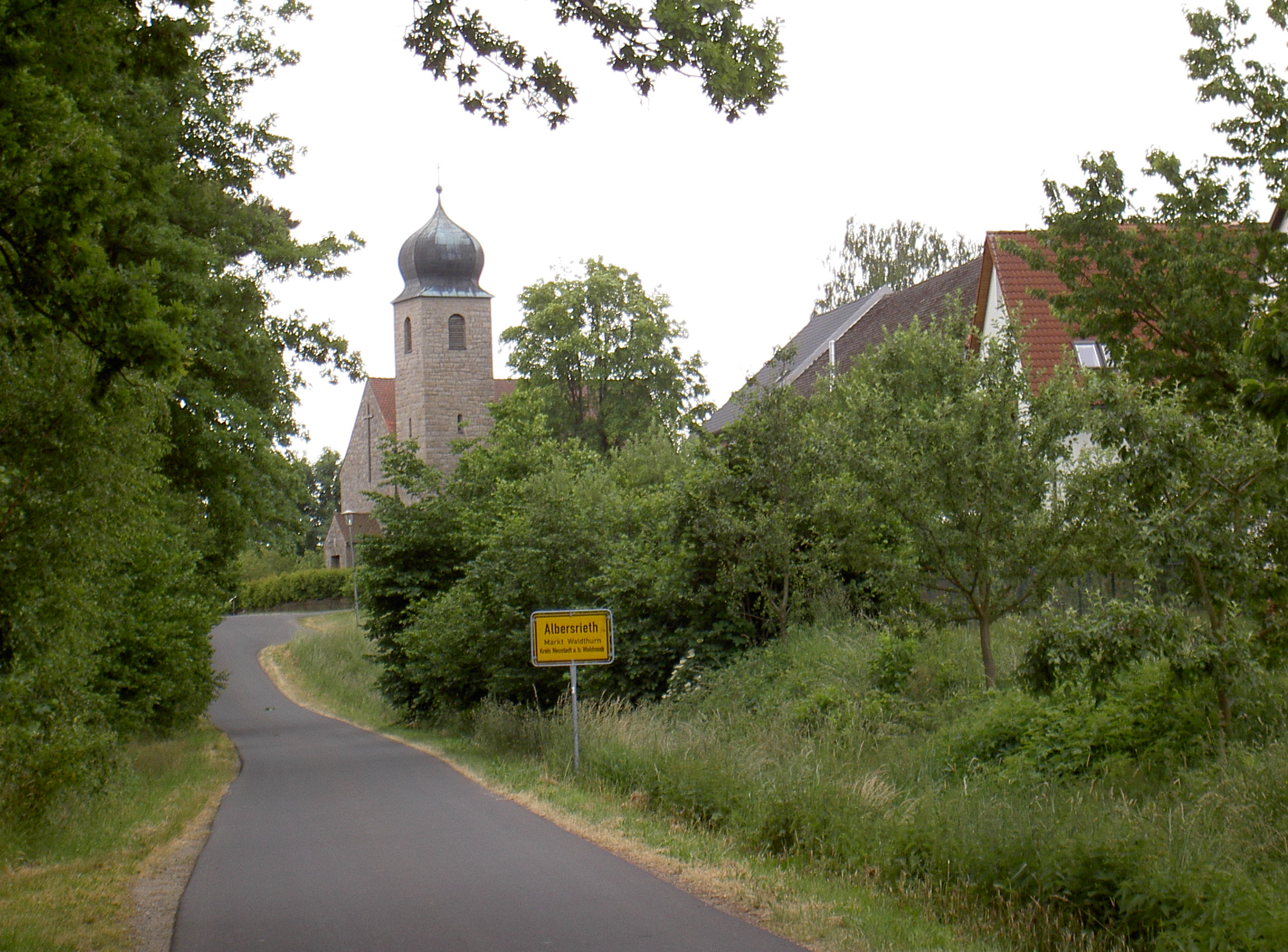 AlbersriethKapelle